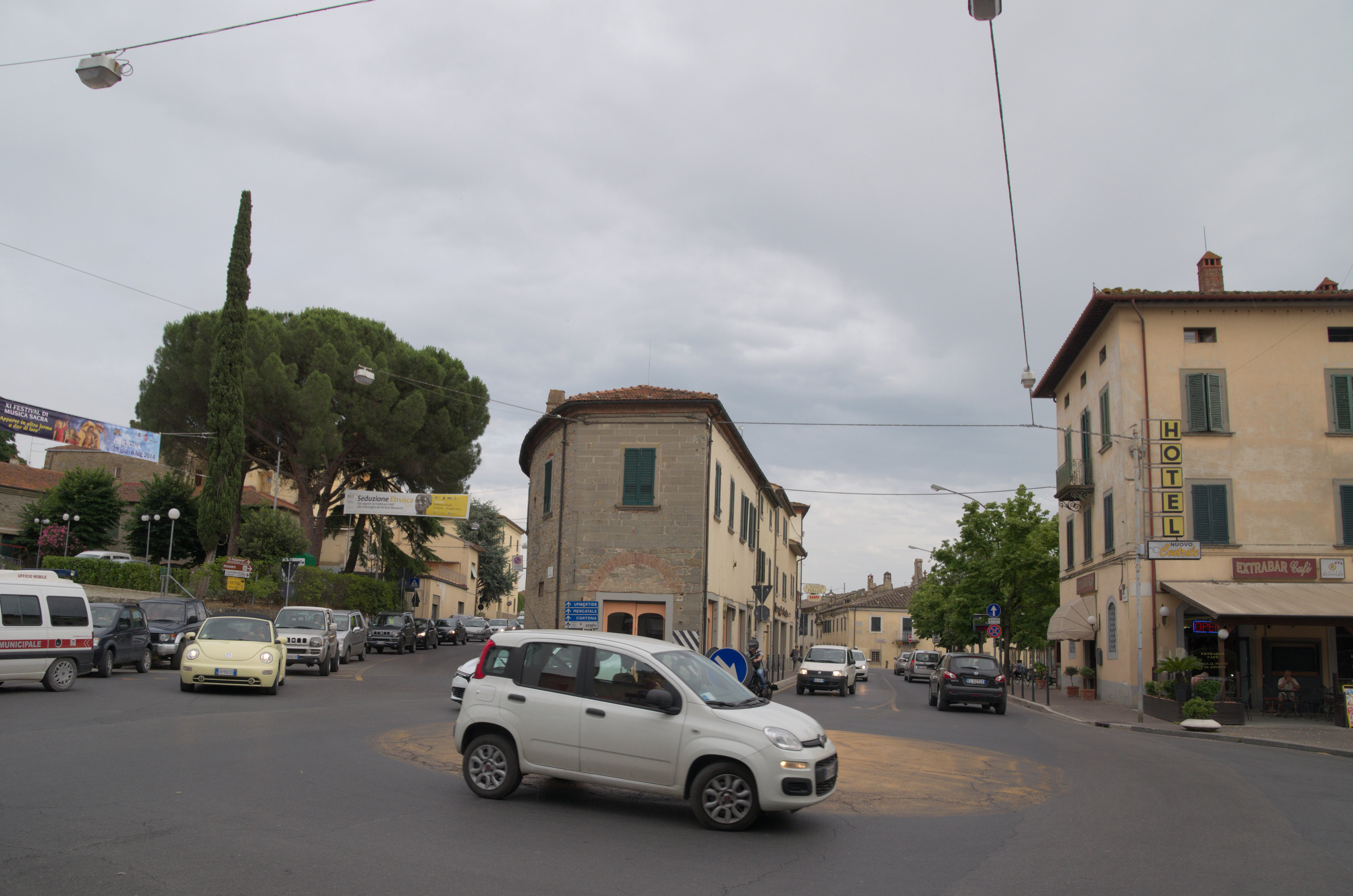 Petite place et rond point en face de la « Chiesa di Cristo Re » (à gauche, à l'Est), donnant à droite (à l'ouest), en contrebas, vers la gare Camucia-Cortona, tout droit à gauche, vers le centre de la ville ancienne de Cortona.